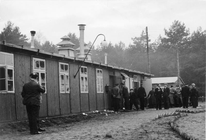 Einheitsbaracke des Reichs-Autobahn-Lagers